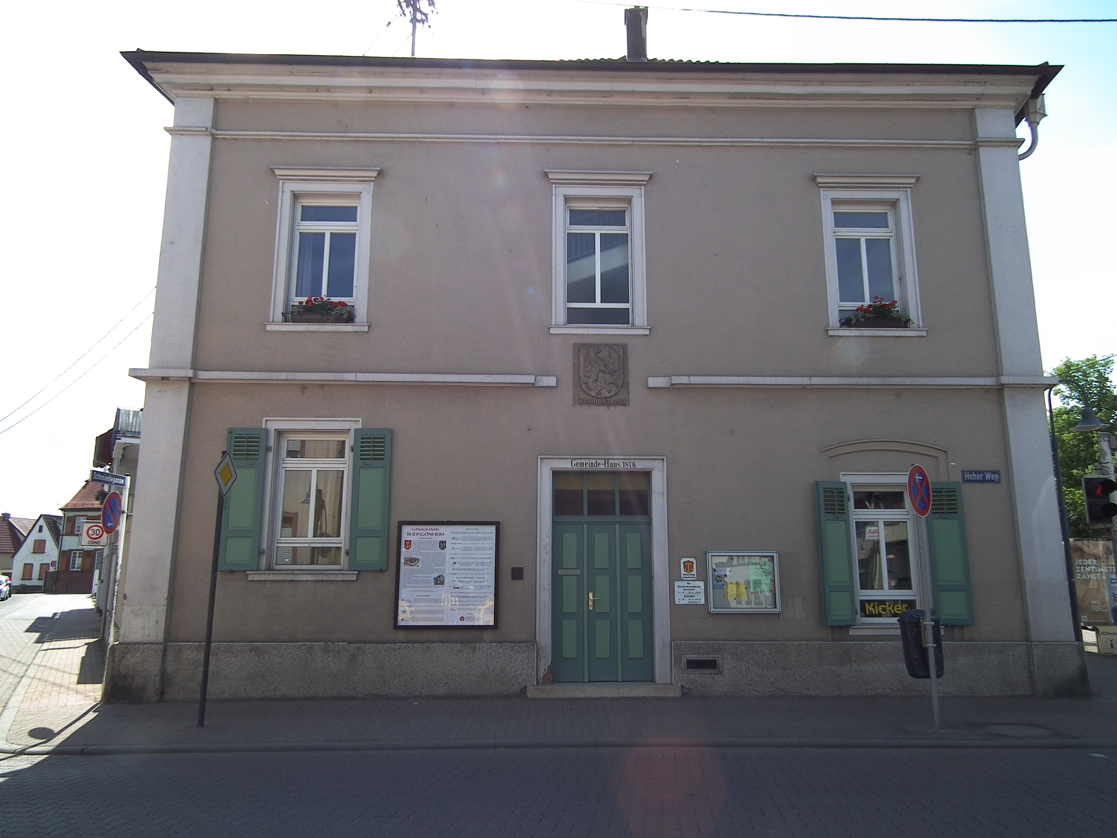 Gemeindehaus und Außenstelle der Stadtverwaltung Ludwighafen in Rheingönheim (Rheinland-Pfalz, Deutschland)